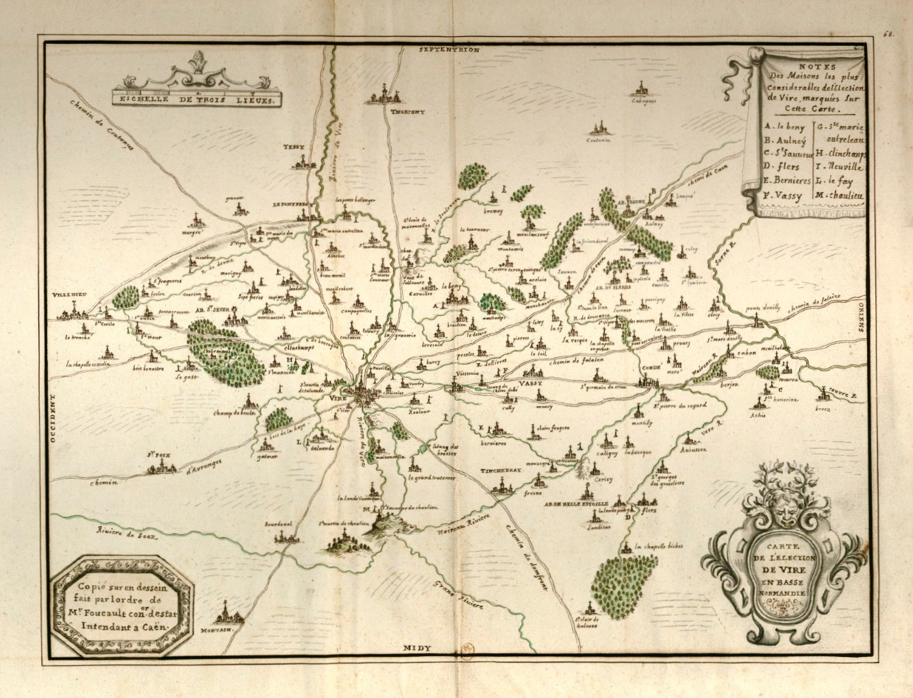 Carte de l'élection de Vire en Basse-Normandie, XVIIe siècle.